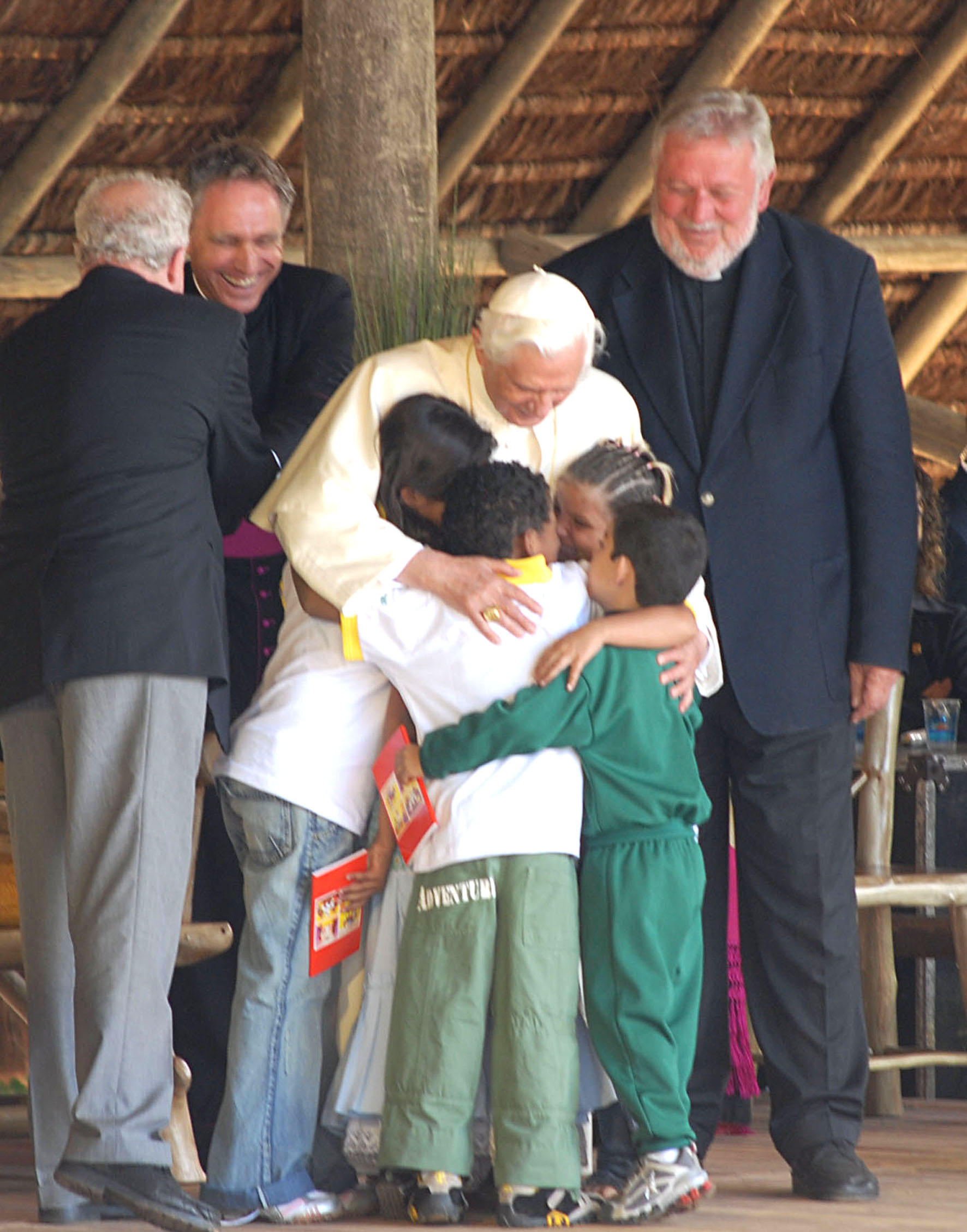 Papa Bento XVI visita a "Fazenda Esperança", local de recuperação de dependentes químicos localizado na zona rural de Guaratinguetá, São Paulo, Brasil.